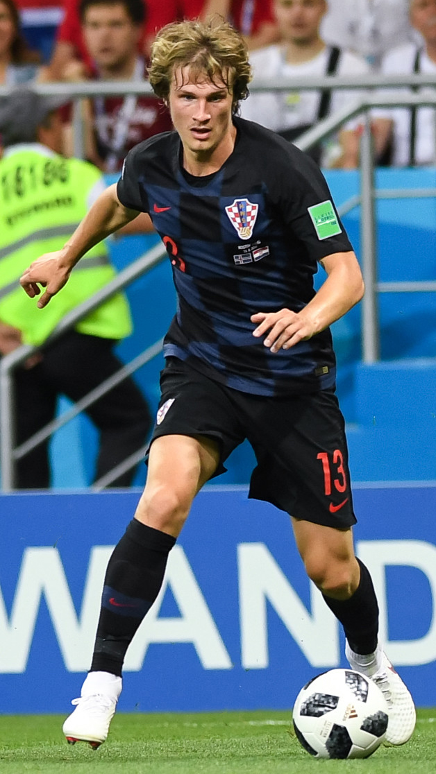 Сборная Исландии уступает Хорватии и покидает ЧМ-2018